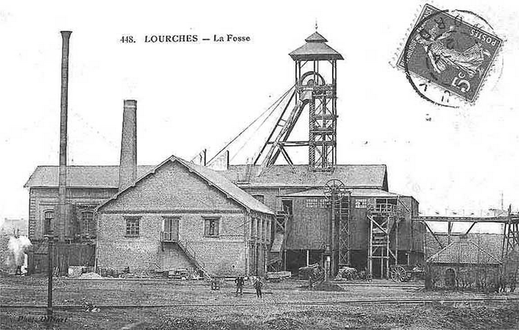 La fosse La Naville ou n° 7 de la Compagnie des mines de Douchy était un charbonnage constitué d'un seul puits situé à Lourches, Nord, Nord-Pas-de-Calais, France.